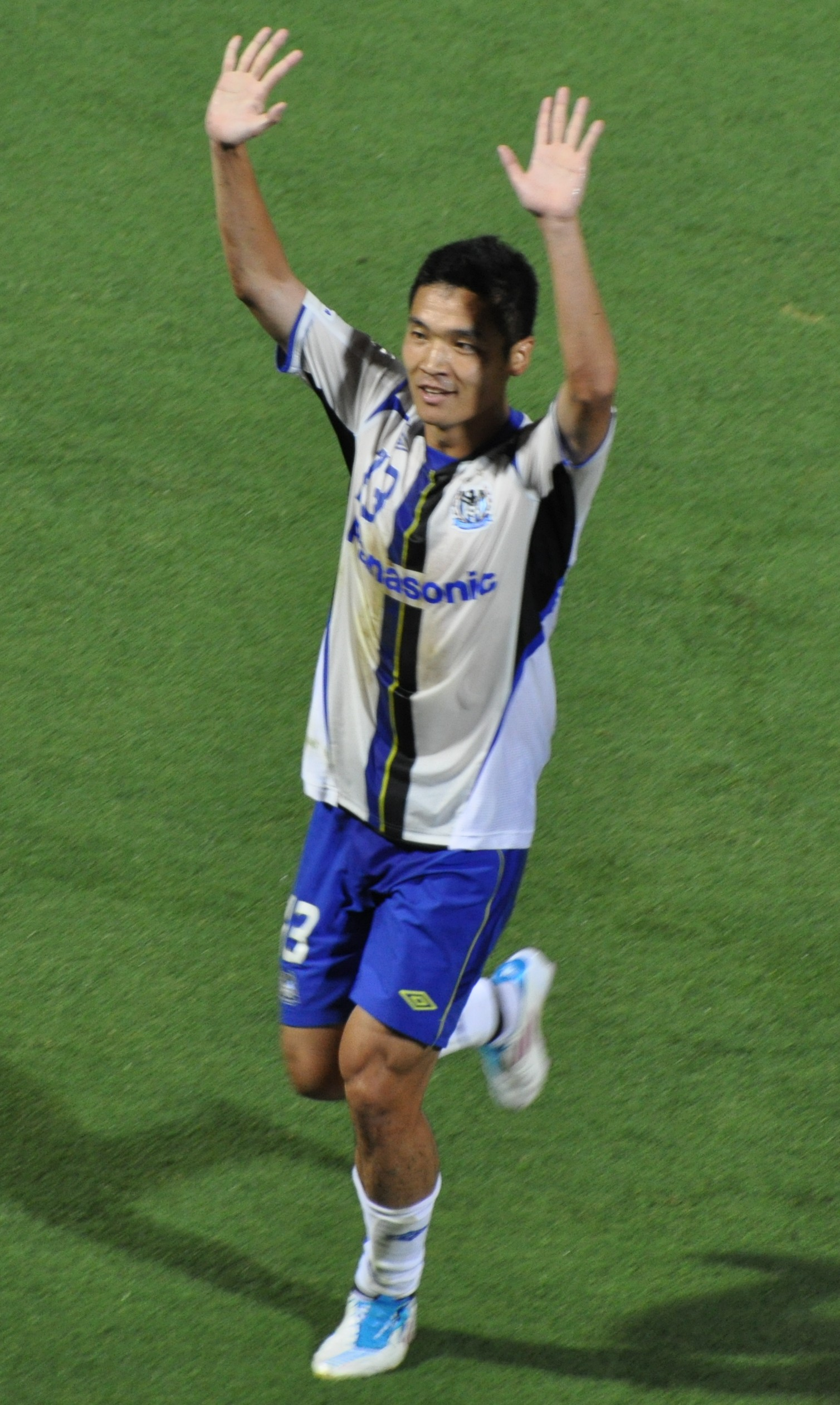 Kim Seung-Yong celebrates after scoring for Gamba. 2011.07.10 Omiya Ardija 2-3 Gamba Osaka_232